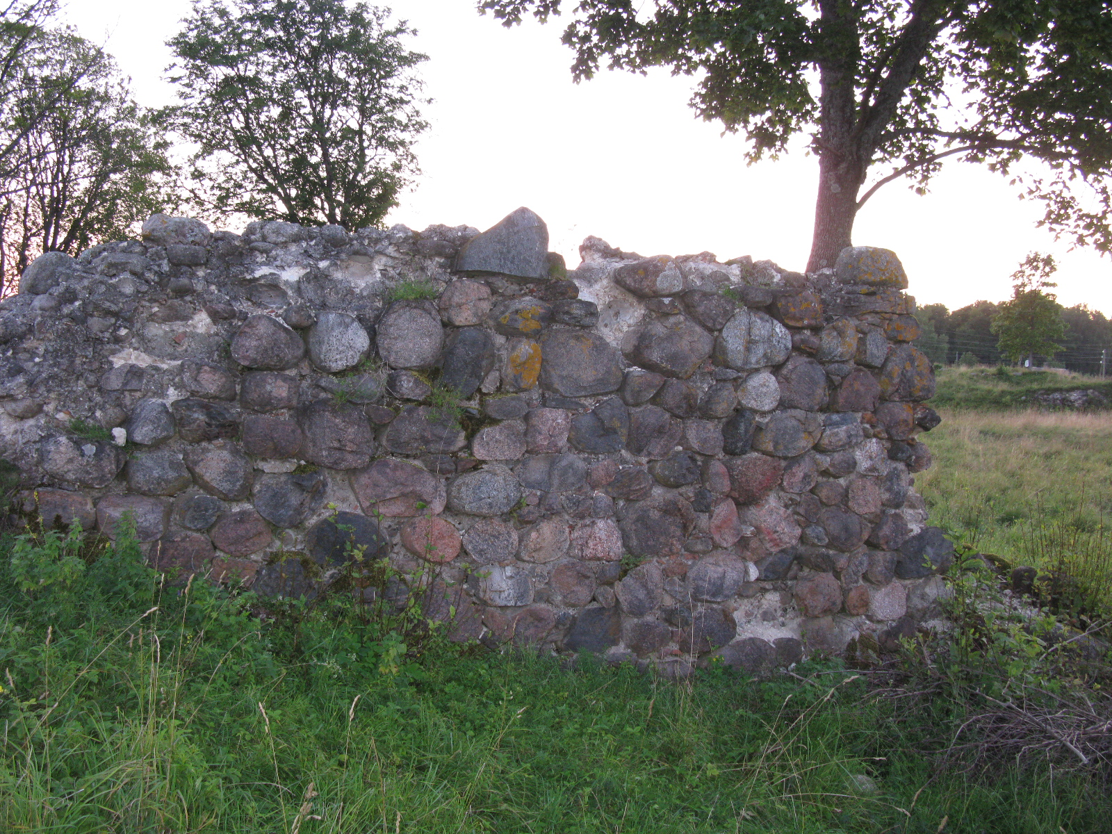 Lõunapoolse hoonetiiva idasein.